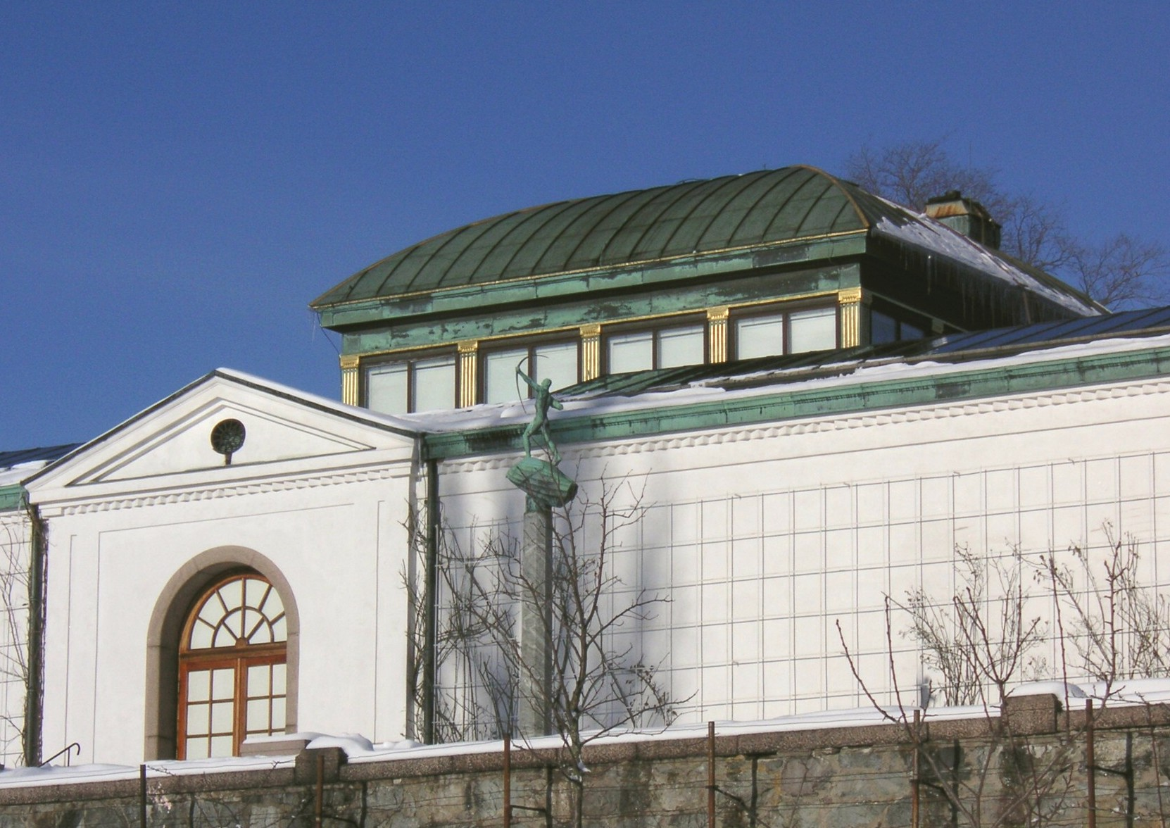 Waldemarsudde på Djurgården i Stockholm